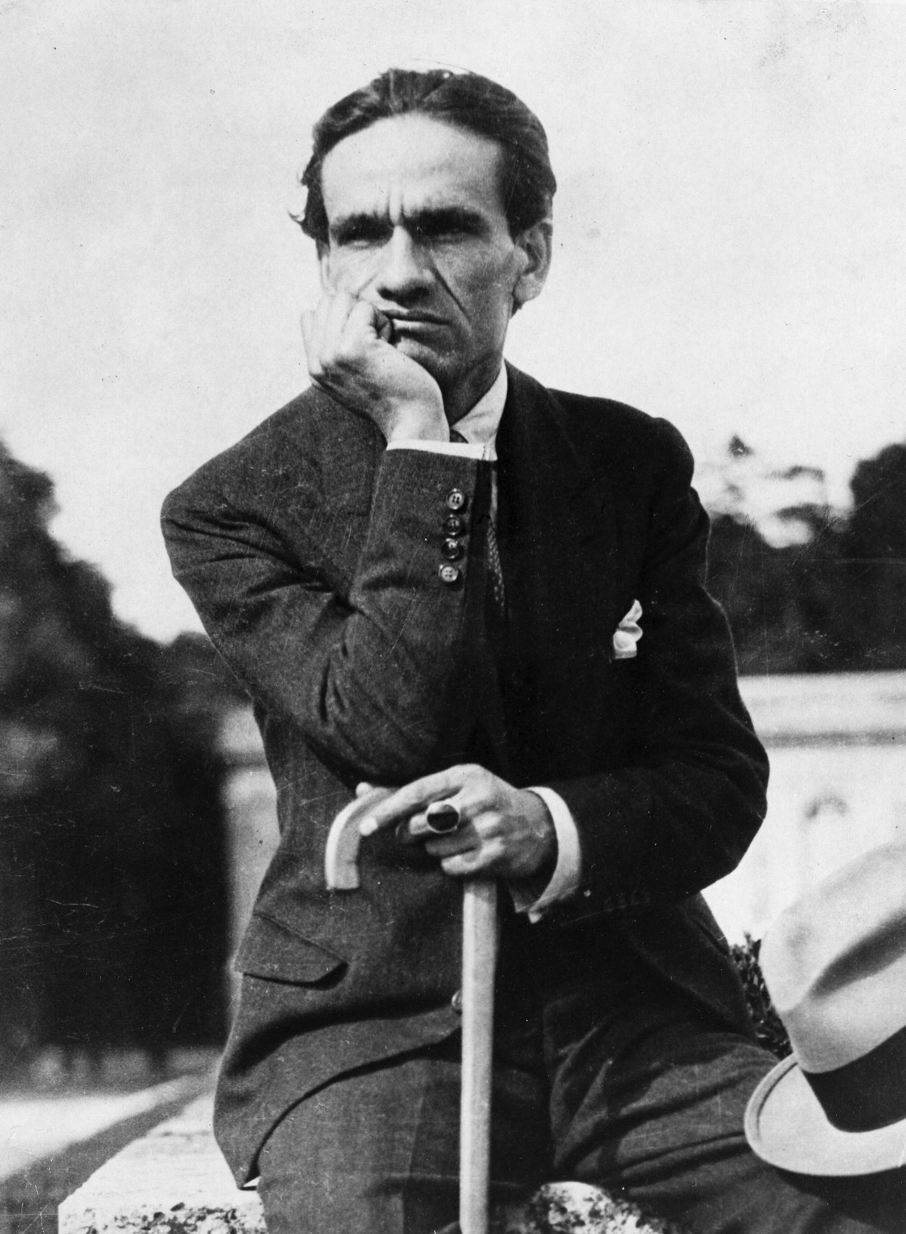 fotografia de César Vallejo en el Parque de Versalles